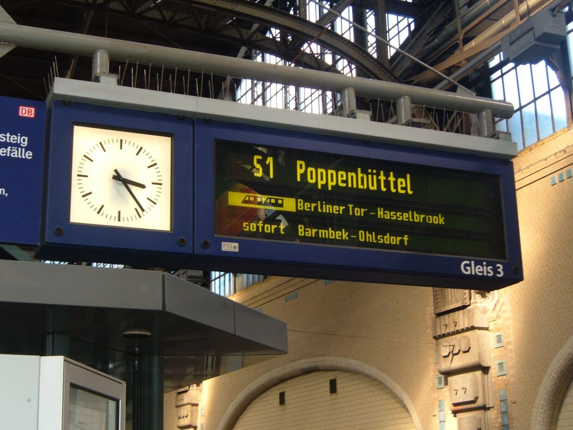 Elektronisches Fahrgastinformationssystem der Hamburger S-Bahn im Hamburger Hauptbahnhof.